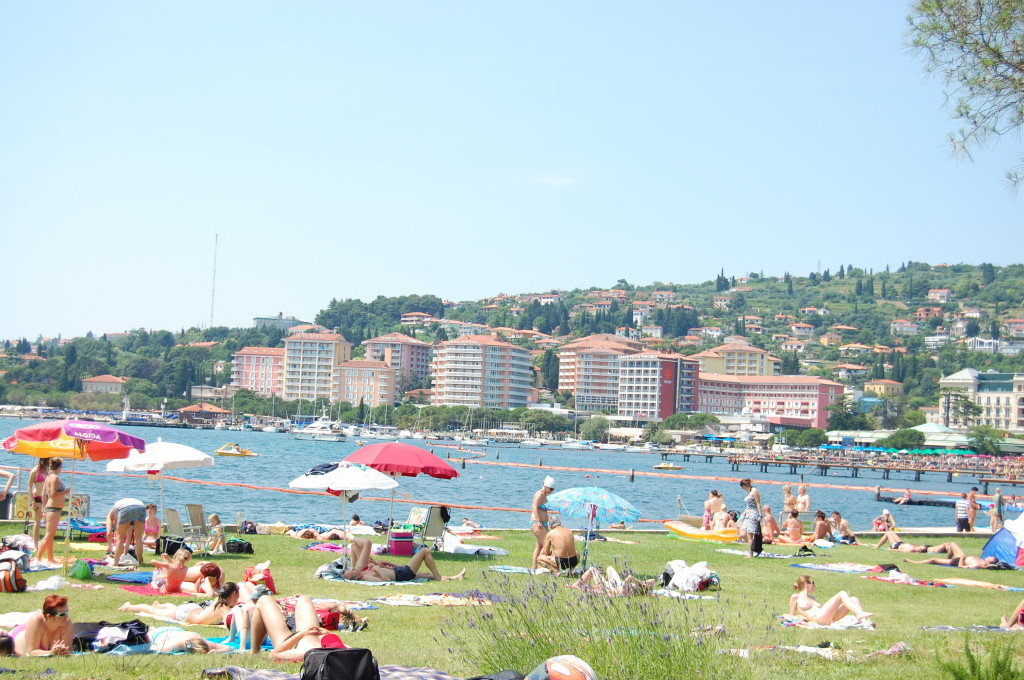 Portoroz